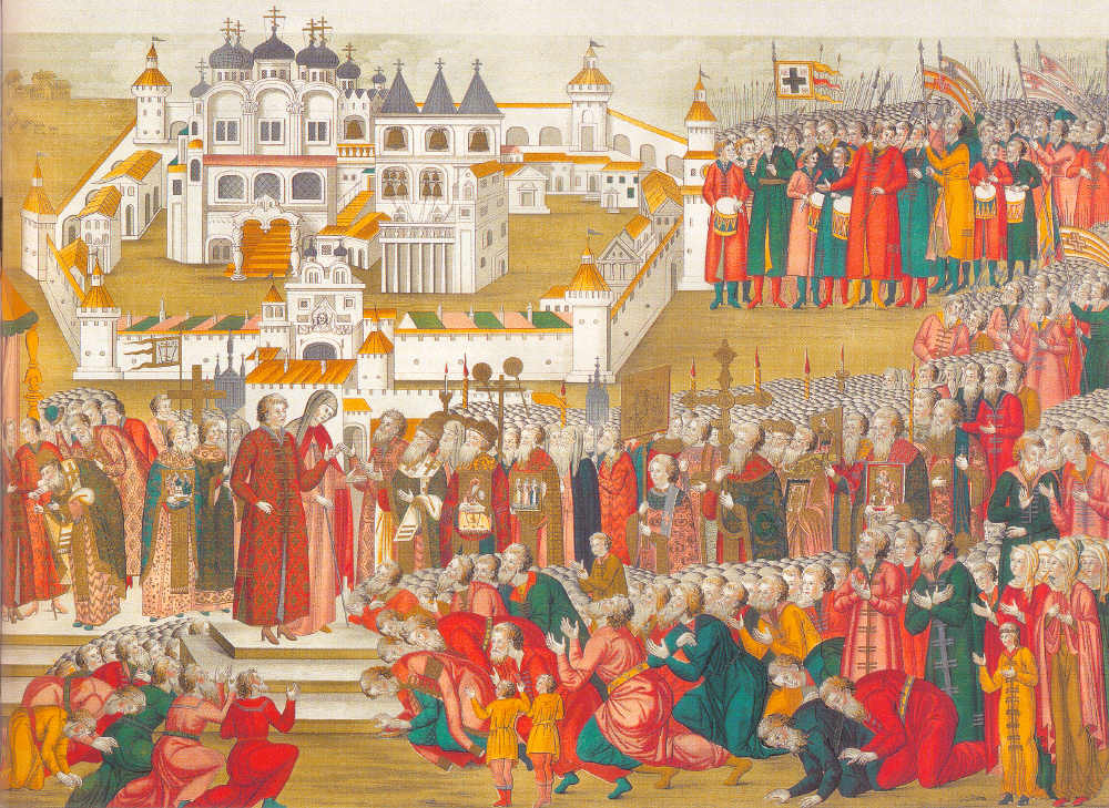 Illumination from a book dated to 1673. It represents a crowd at the Ipatiev Monastery imploring Mikhail Romanov's mother to let him go to Moscow and become their tsar. Посольство Земского Собора, прибывшее в Костромской Ипатьевский монастырь, сообщает Михаилу Романову об избрании Его на Царство 14 марта 1613 года. Михаил Федорович и его мать инокиня Марфа Ивановна принимают от московского посольства челобитные грамоты Земского собора об избрании его на царство у стен Костромского Ипатьевского монастыря. Миниатюра из «Книги об избрании на царство на превысочайший престол великаго российскаго царствия Великаго Государя и Великаго Князя Михаила Феодоровича всея великия России Самродержца. 1673 год»